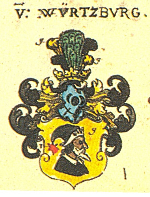 Ritterschaft und Adel in Franken Wappen der Familie von Würtzburg.